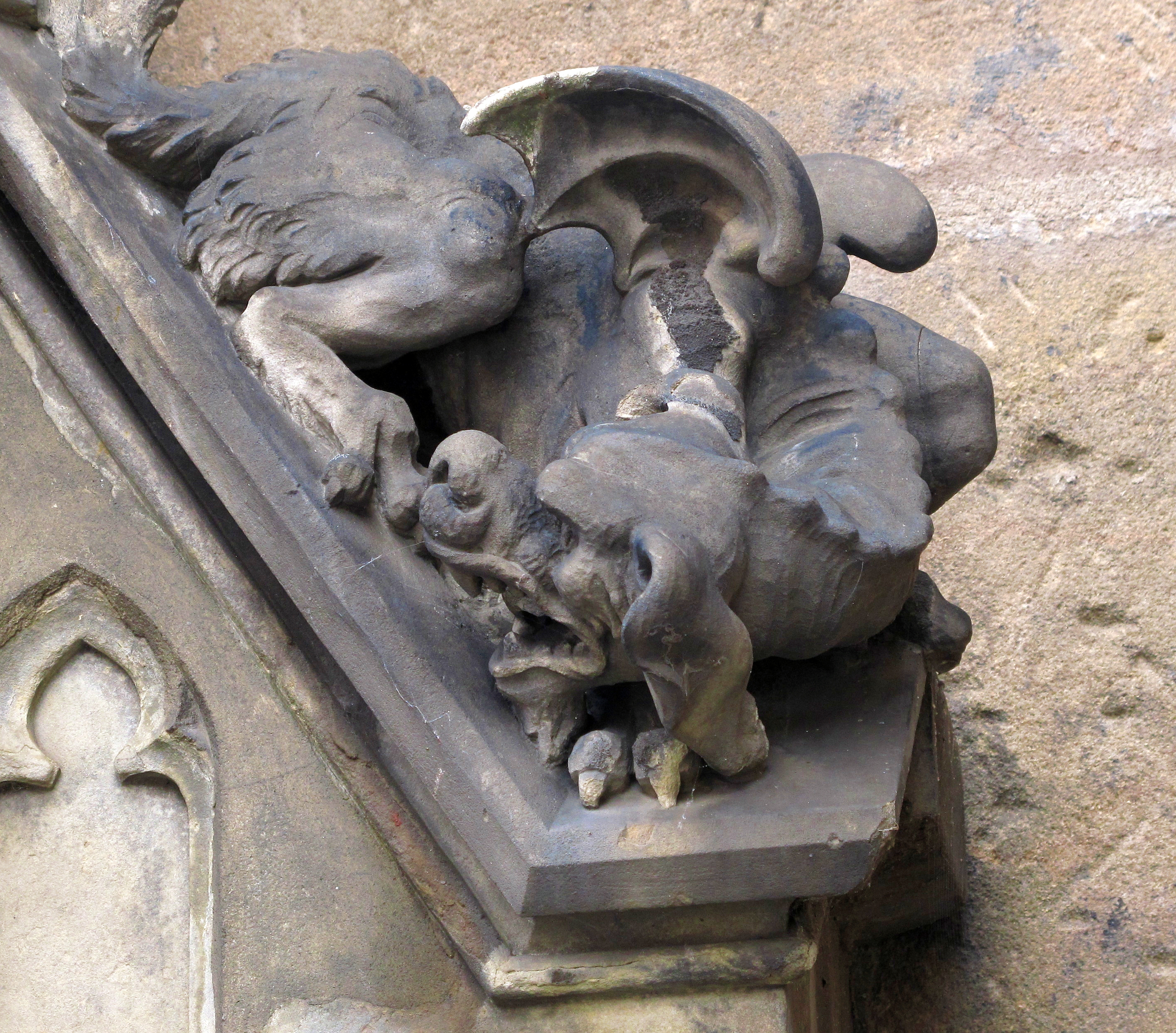 Teufelsbrünnlein Detailansicht